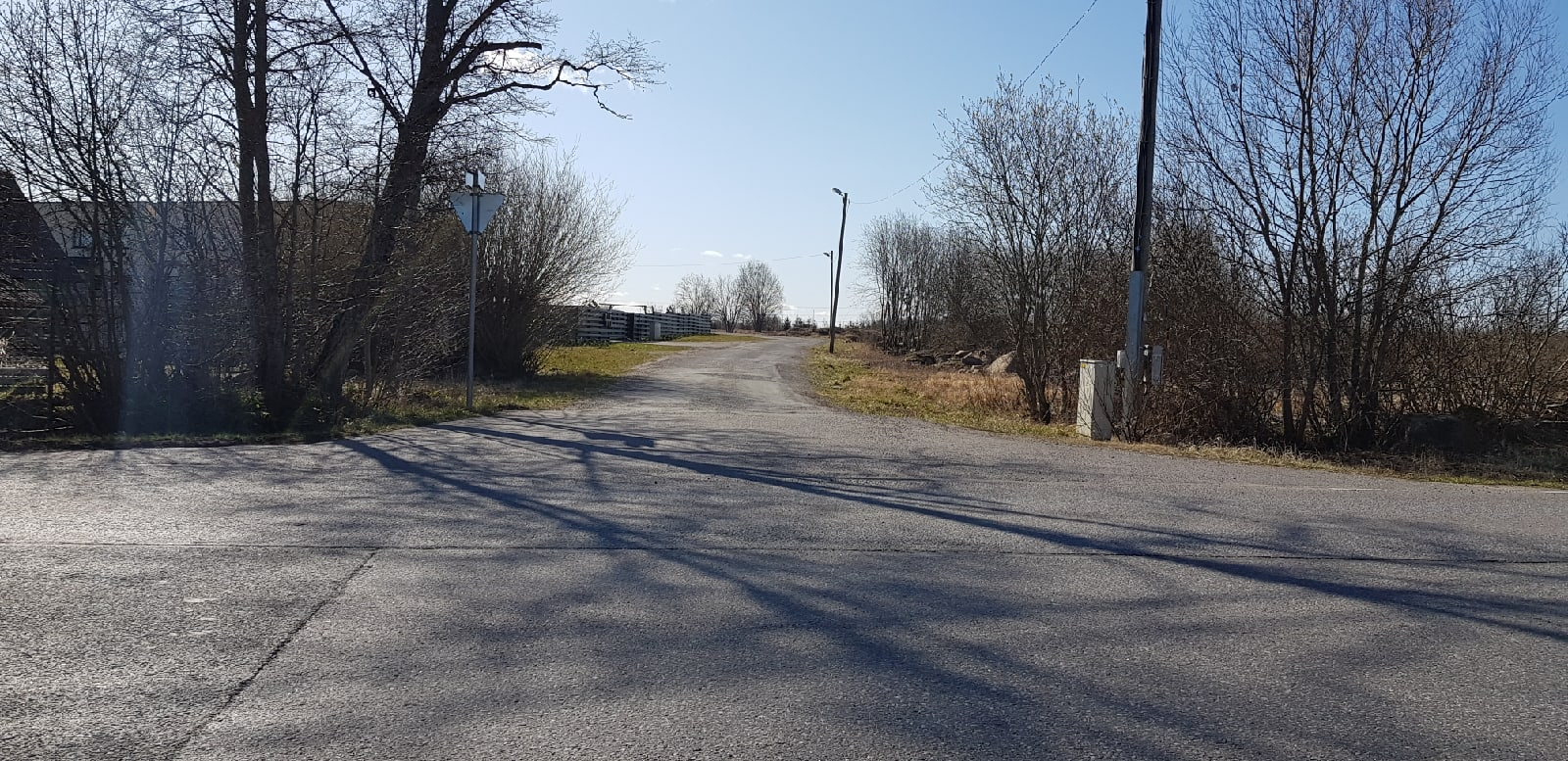 Vaade Ööbiku teele Veski tänavalt, Assaku.